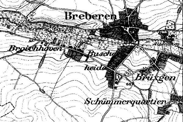 Neuaufnahme 1891-1912